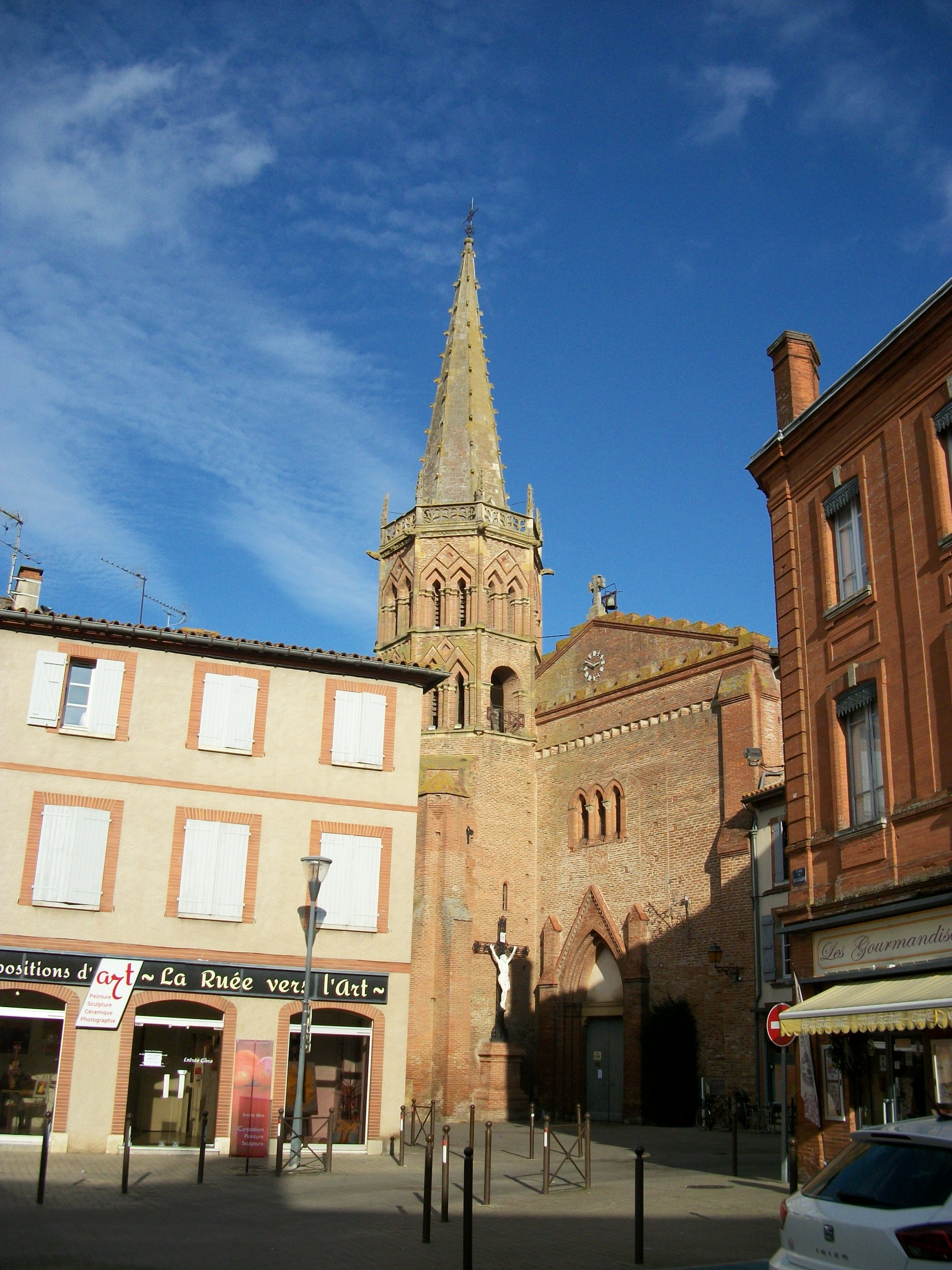 L'Église Saint-Jacques et son clocher octogonal